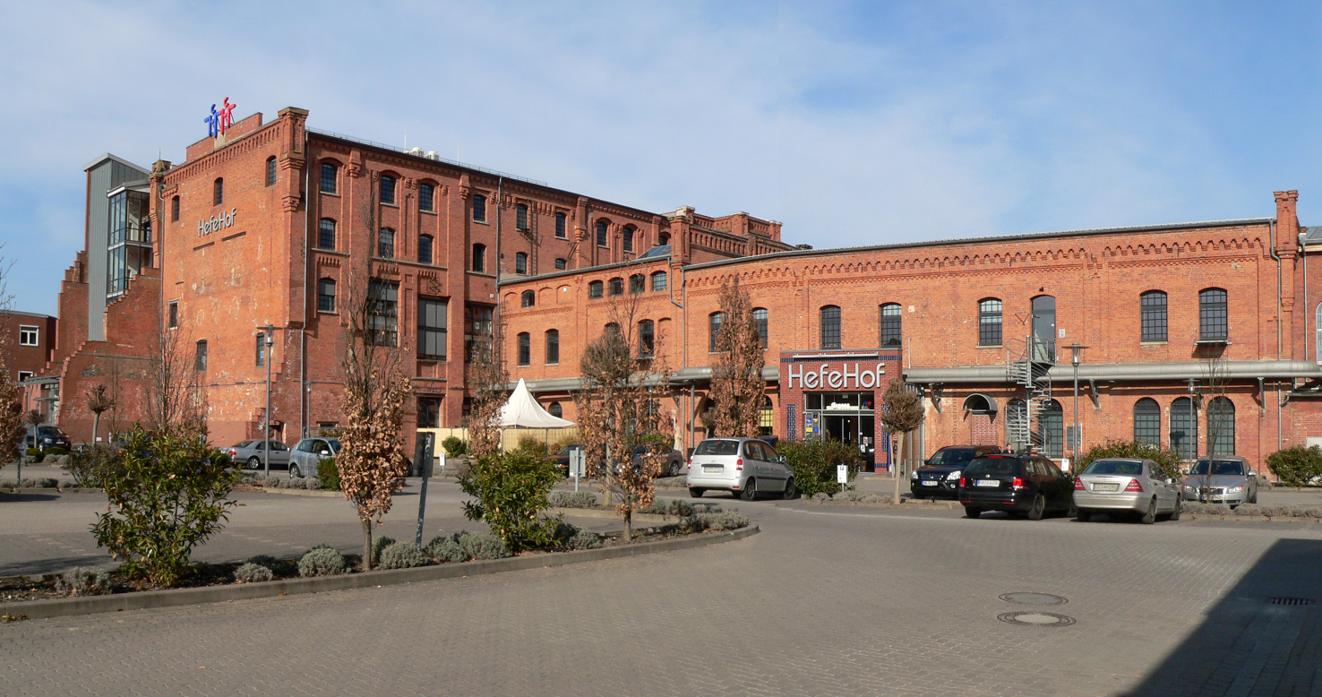 Hefehof